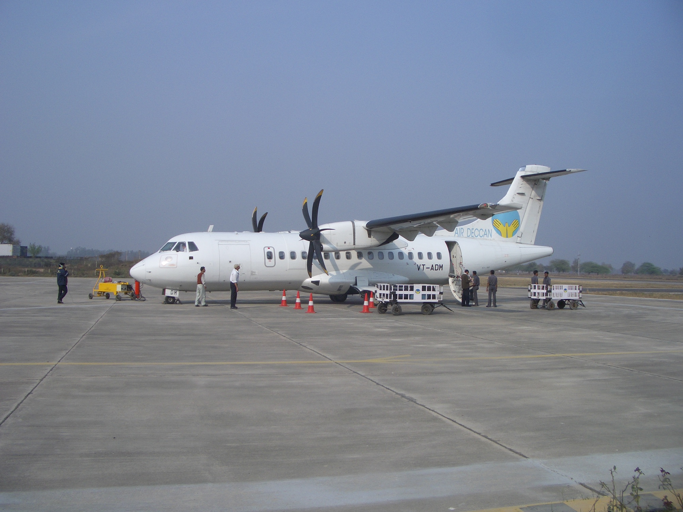 0064 Airport Kanpur 2006-02-07 15-21-59